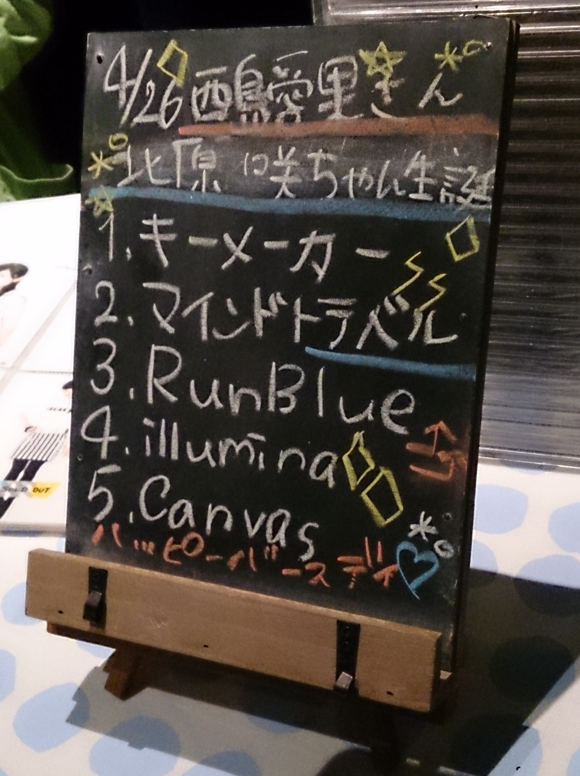 amiinaセトリボード(20150426(1))